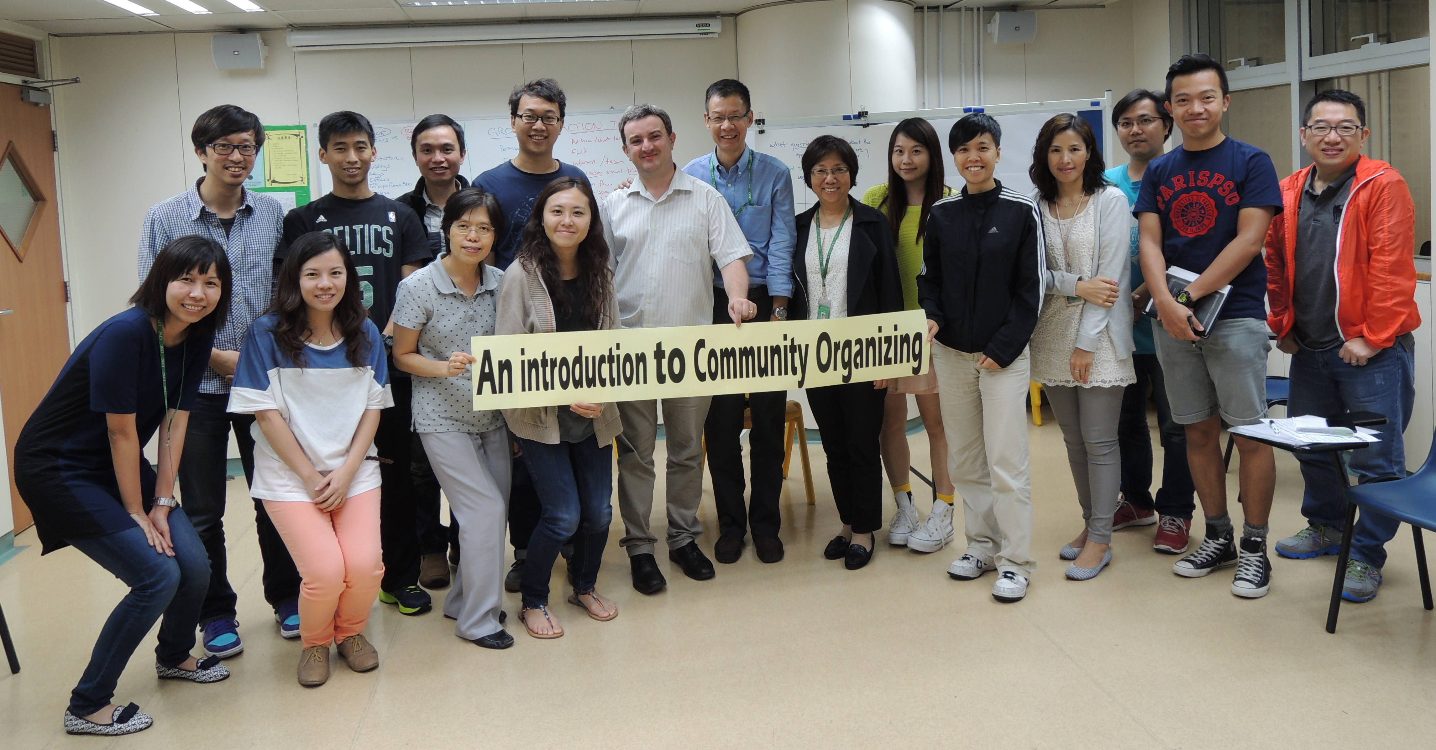 Formation à l'organisation collective dans la ville de Hong Kong